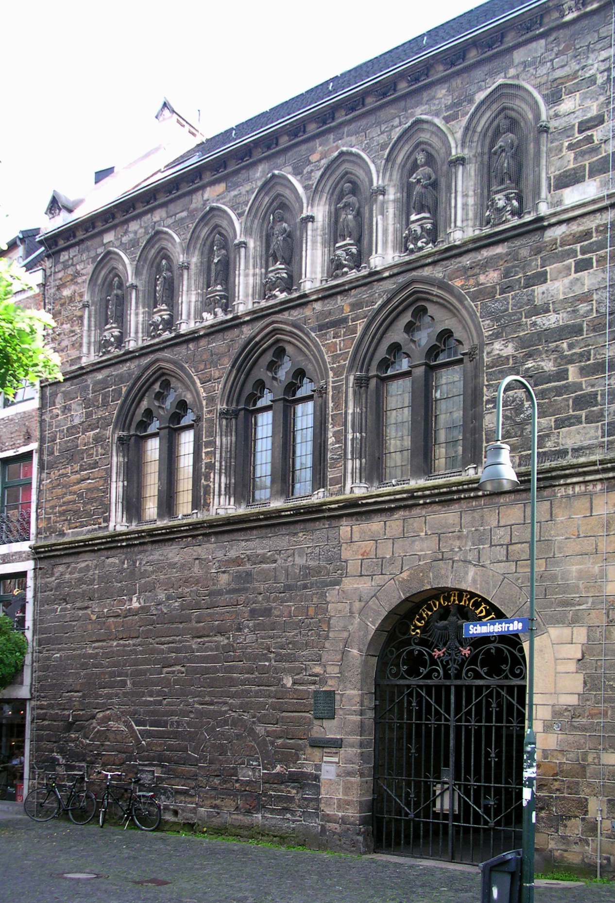 Aachen, Grashaus am Fischmarkt (1267 unter Richard von Cornwall als Aachens erstes Rathaus errichtet) - heute Stadtarchiv